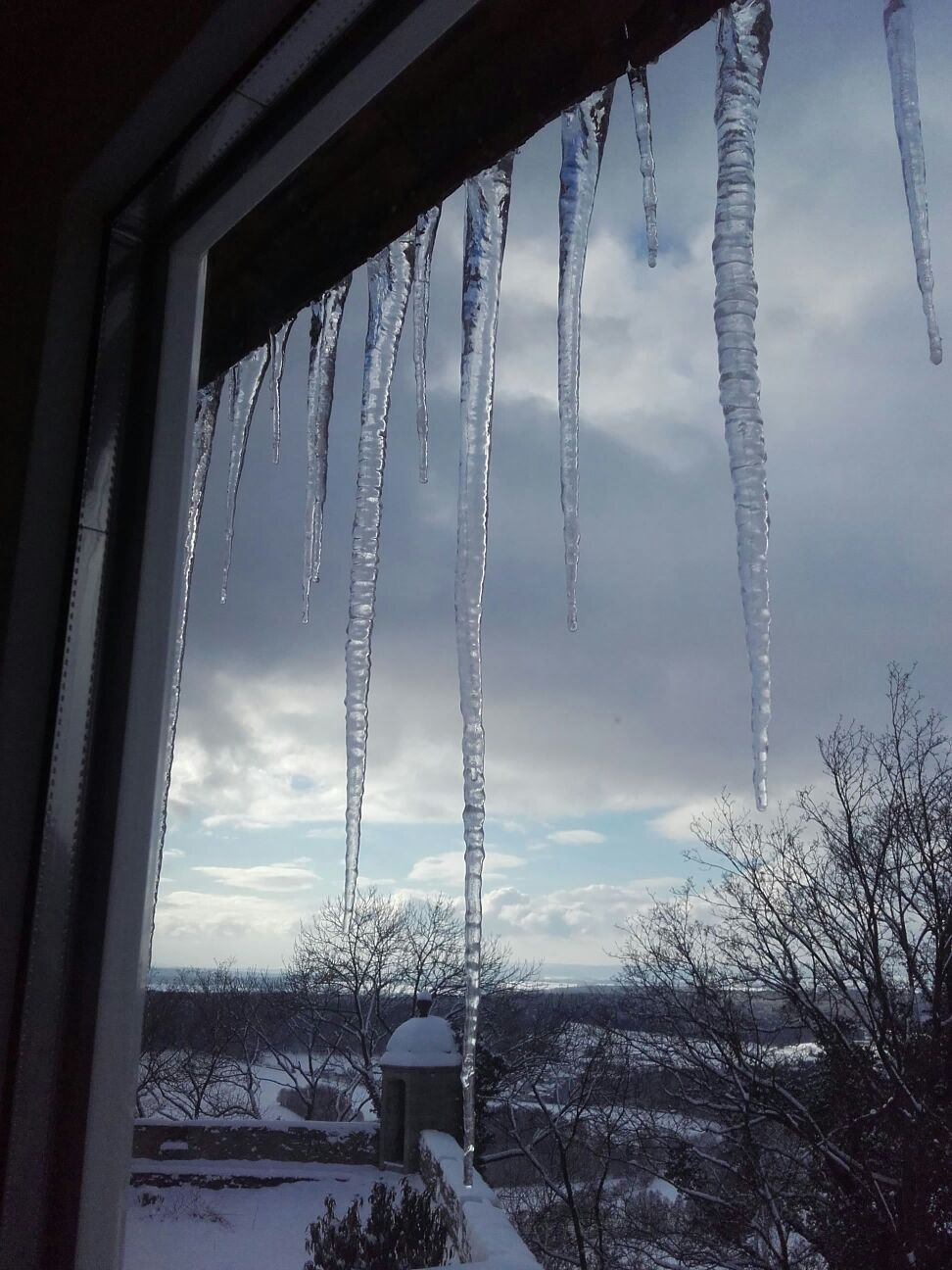 Carambelos en Hofbieber, Alemaña (xaneiro de 2016).